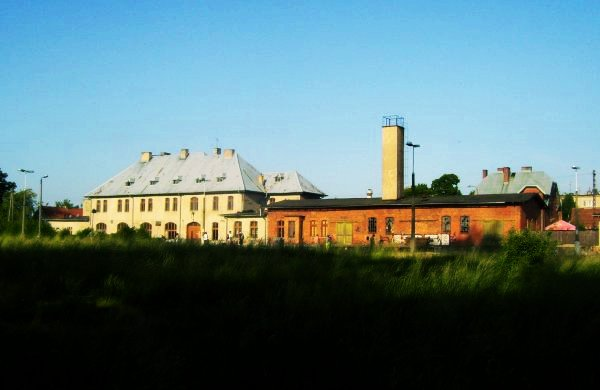 Dworzec Kolejowy